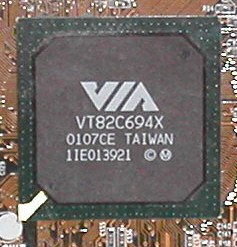 Apollo Pro 133A Northbridge (VT82C694X) auf einen VIA-Board, veraltet (Eisleben, 24. März 2005)